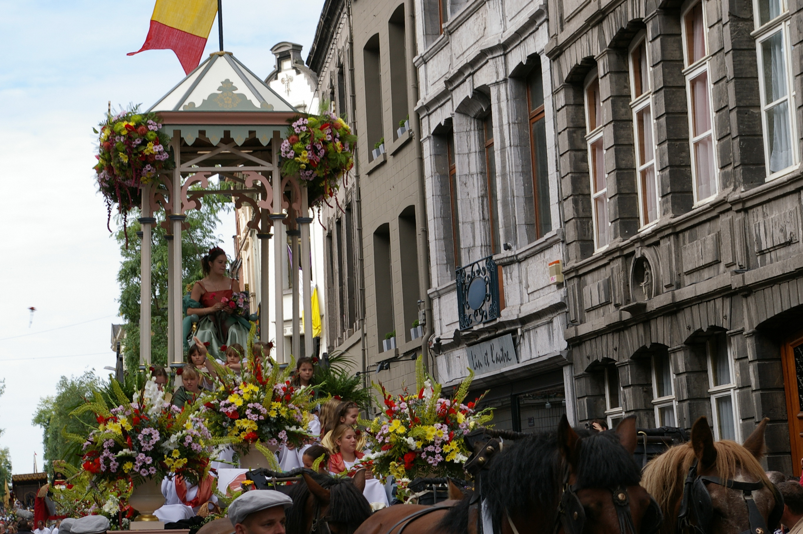 Char de l'Horticulture, Ducasse d'Ath 2008